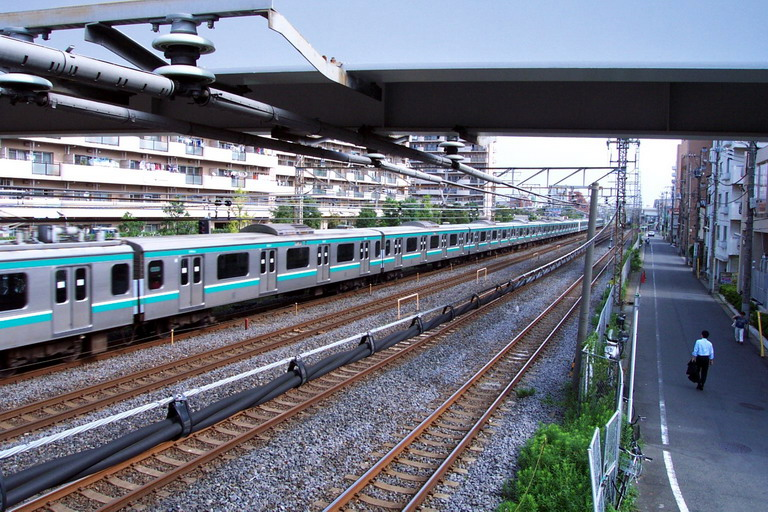 in Matsudo - Japan